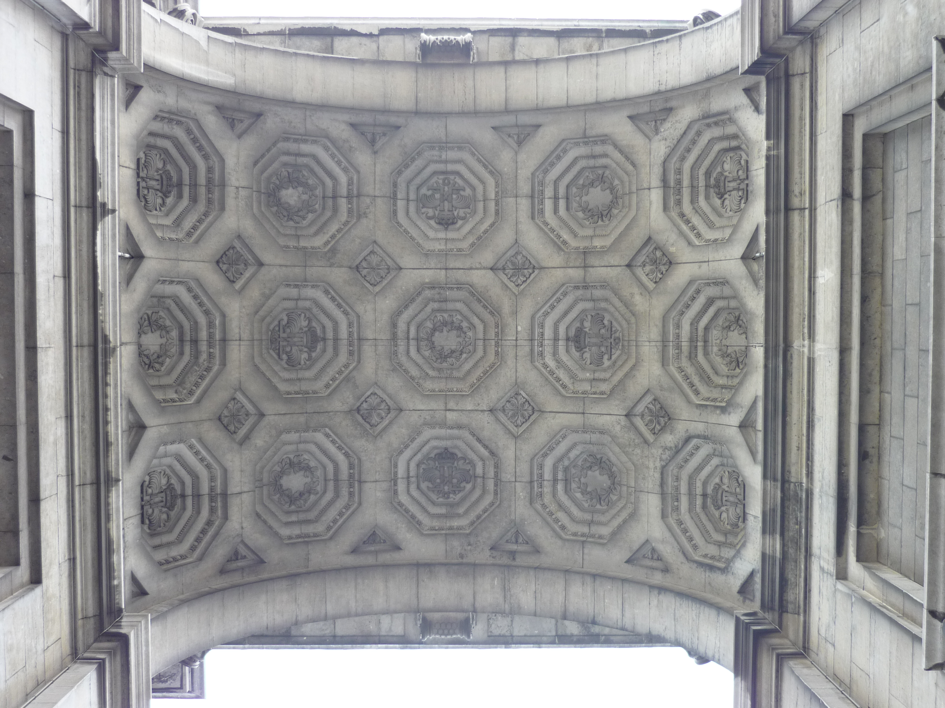 Plafond des arcanes de l'Arc de Triomphe du Parc du Cinquantenaire de Bruxelles, constitué de caissons sculptés. Royal Museums of Art and History Native nameMusées royaux d’art et d’histoireLocationBrusselsCoordinates50° 50′ 26″ N, 4° 23′ 35″ E Established1835Website control VIAF: 312540662 ISNI: 0000 0001 2342 957X GND: 1006854-5 SUDOC: 162391722